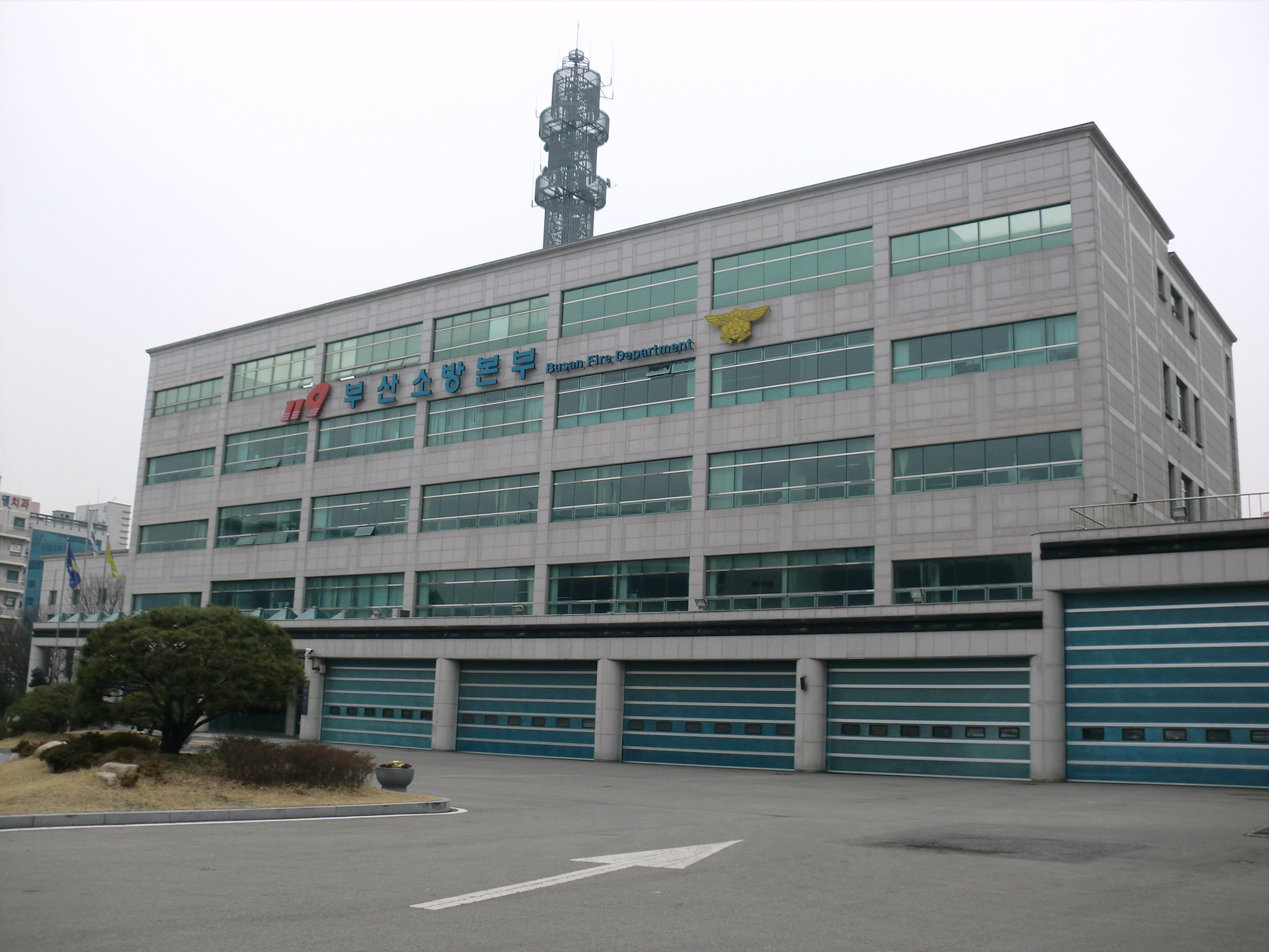 부산소방본부 동래소방서와 겸용